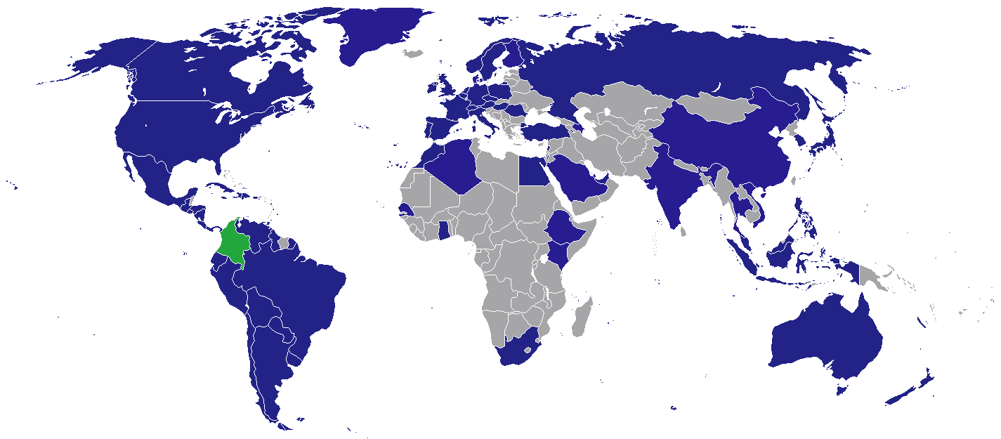 Mapa de los paises donde Colombia Tiene Representación Diplomatica